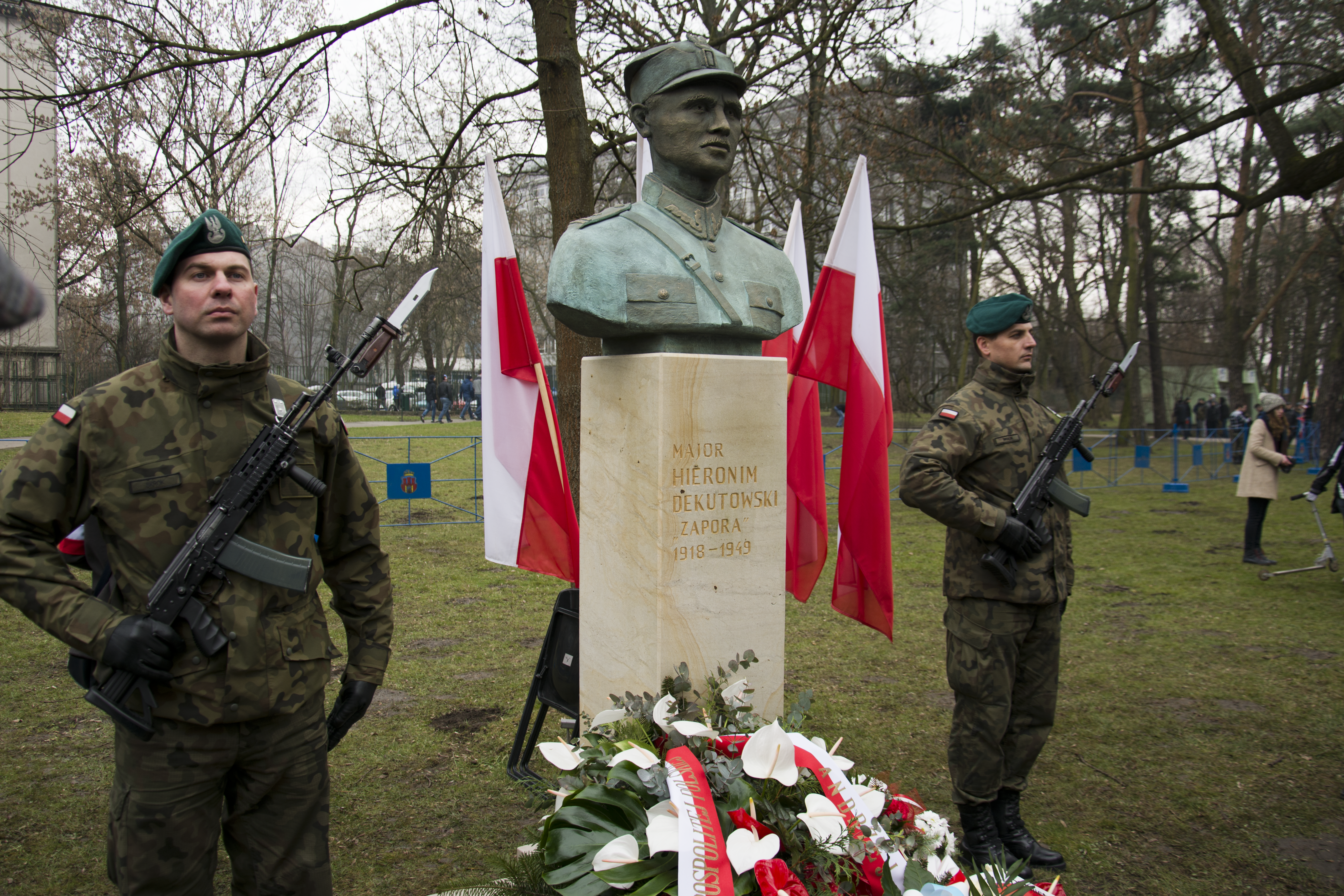 Popiersie mjra Hieronima Dekutowskiego „Zapory” w Galerii Wielkich Polaków w Parku im. Henryka Jordana w Krakowie.